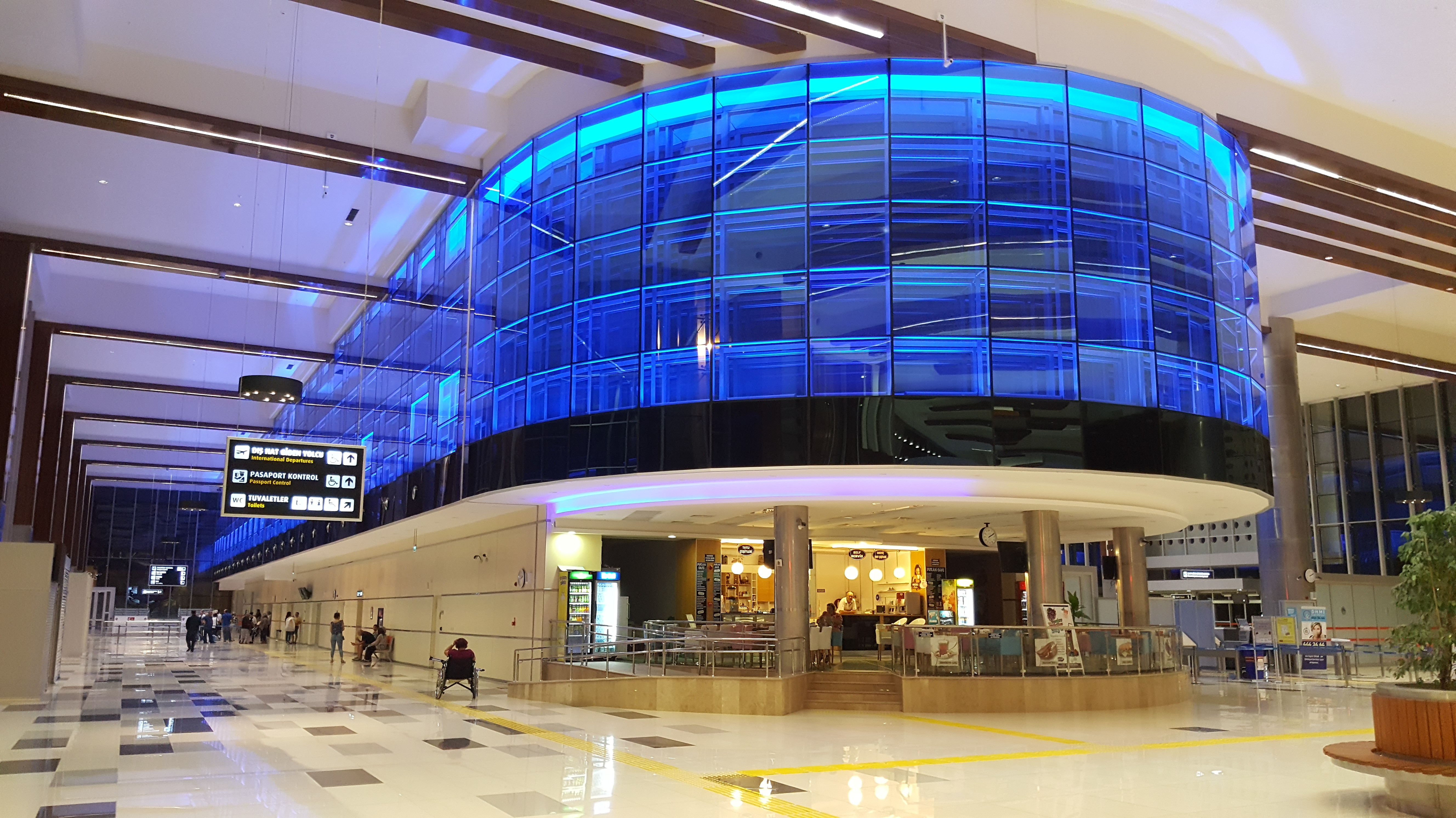 Abflughalle des Flughafen Balıkesir Koca Seyit in der Türkei